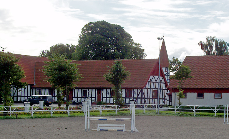 Skårupgård er en herregård som ligger i Todbjerg Sogn, Øster Lisbjerg Herred, Århus Kommune, Denmark. Hovedbygningen er opført i 1770